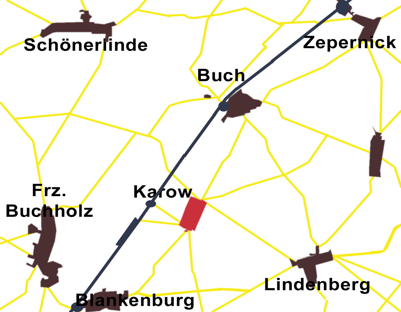 Das Straßennetz in der Umgebung von Karow (heute Ortsteil Karow im Bezirk Pankow von Berlin) um das Jahr 1880, nach einer Karte gezeichnet = Karte des Landes zunächst Berlin, Verlag der Königlich Preußischen Landes-Aufnahme, Preußischer Generalstab 1871 mit Nachträgen.